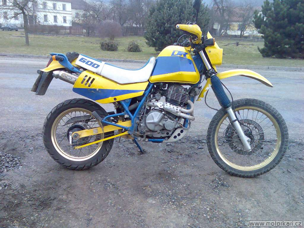 DR 600